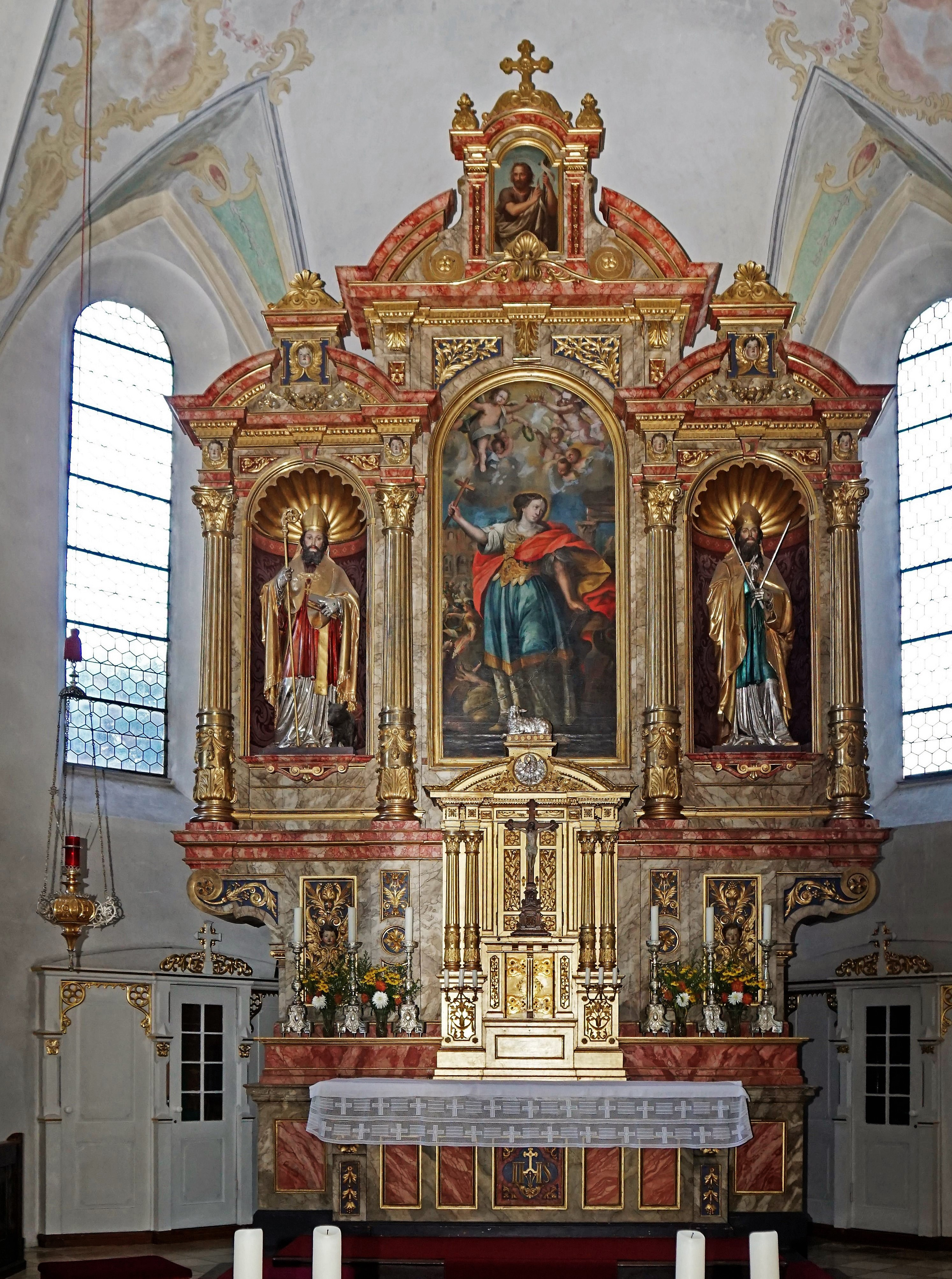 Pfarrkirche Hl. Margaretha, Frasdorf, barocker Hochaltar